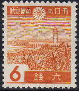 台湾最南端にあるオーロワンピ灯台を描く日本の6銭切手。なお当時は台湾は日本領であった。